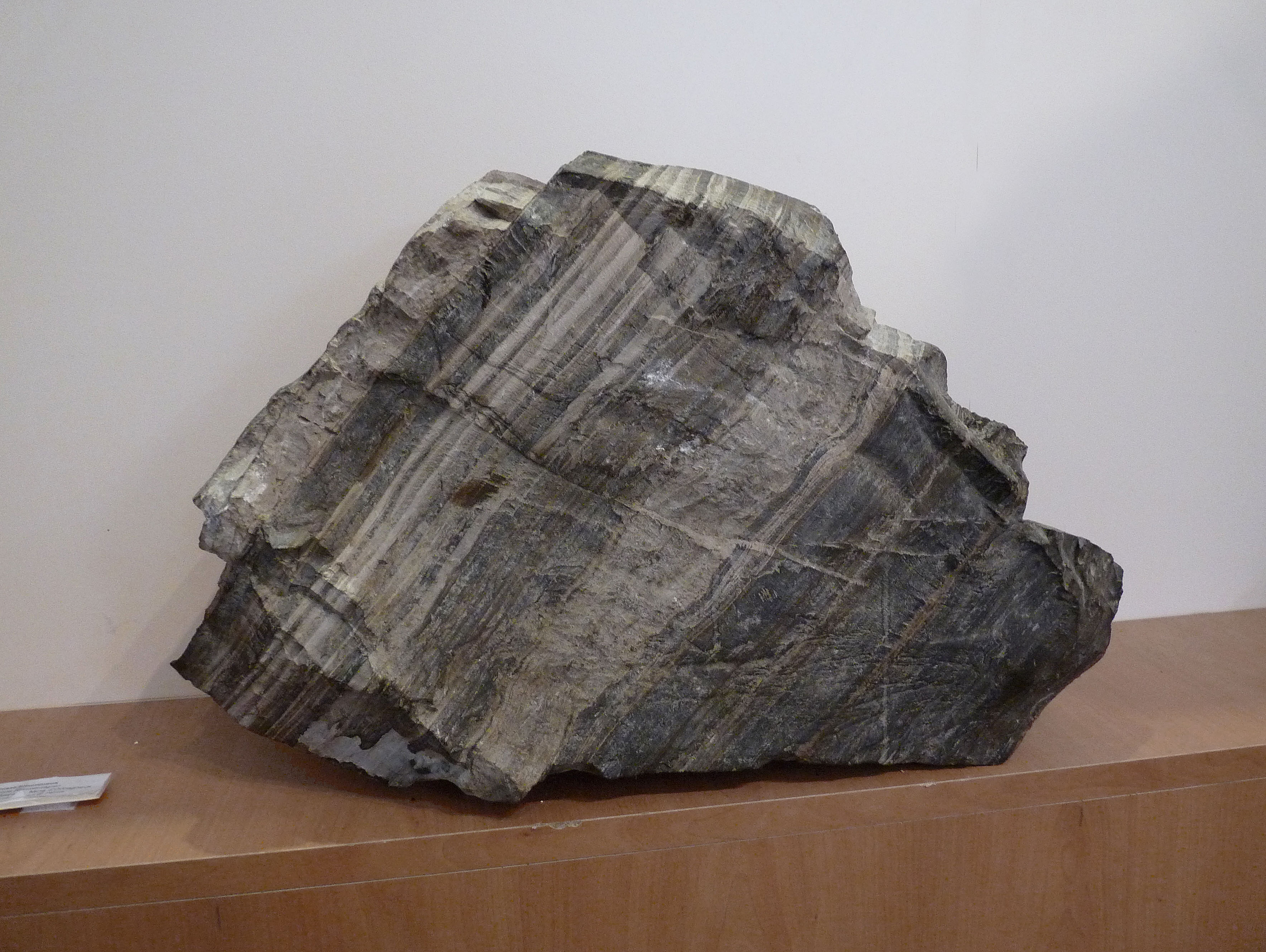 Musée français du pétrole à Merkwiller-Pechelbronn (Bas-Rhin) : Schiste bitumineux. Couche Kimméridgien. Ain, Seyssel, mine d'Orbagnoux.